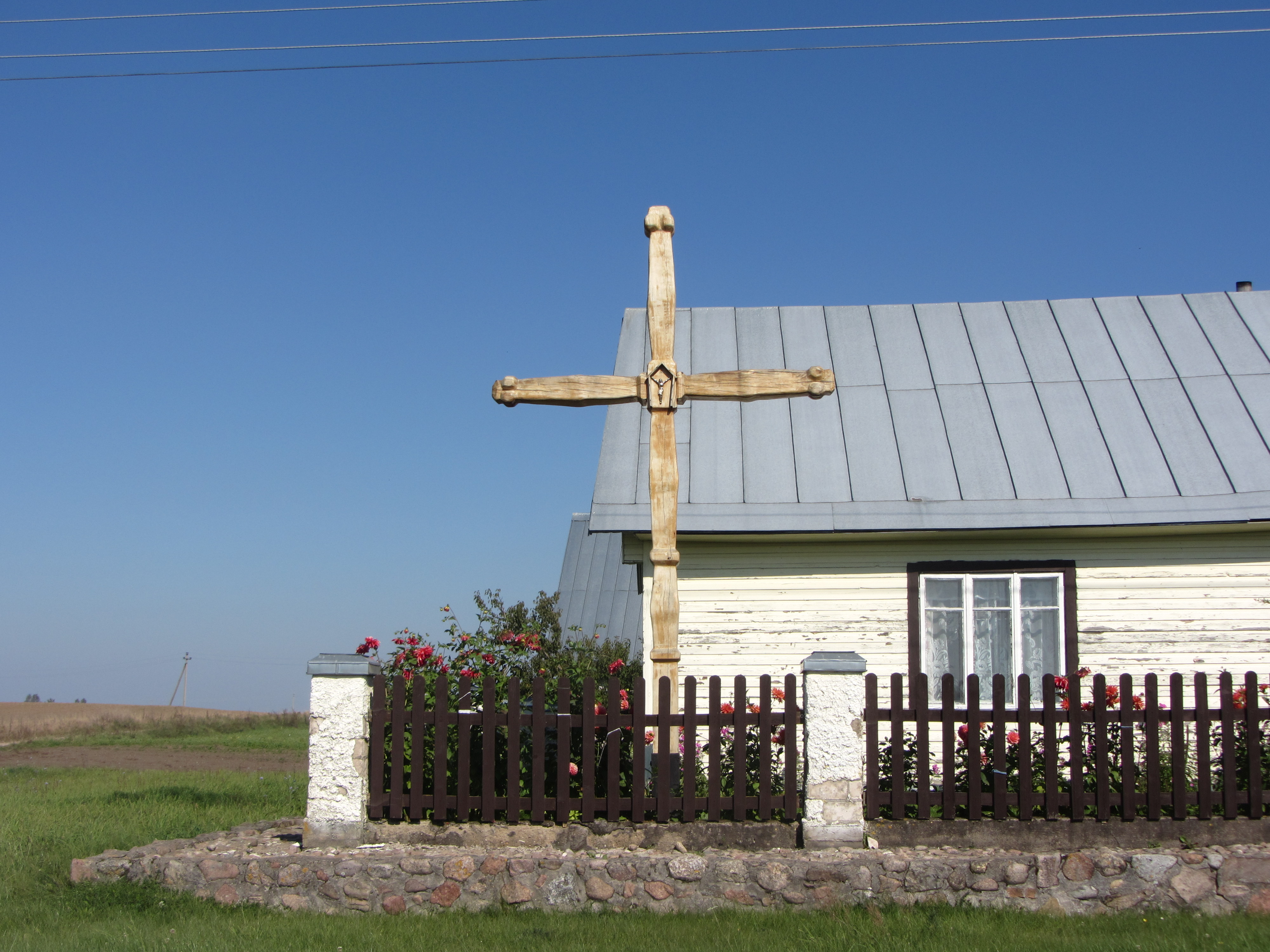 Grendavės sen., Lithuania